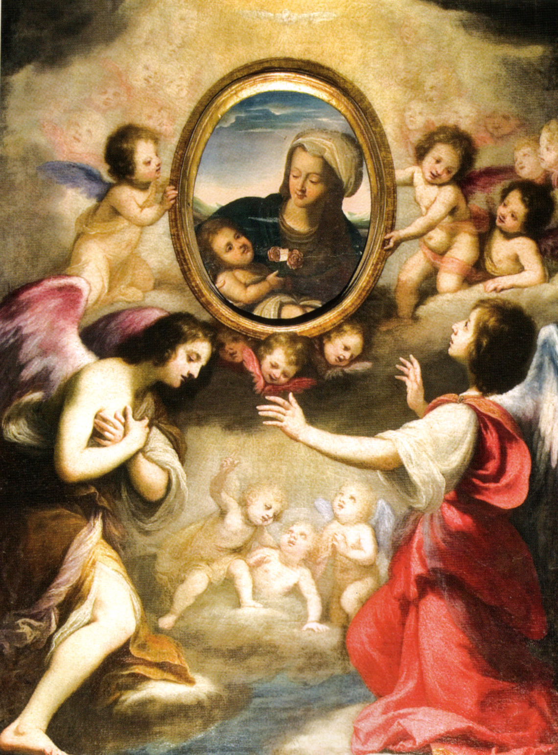 Francesco boschi, adorazione di angeli